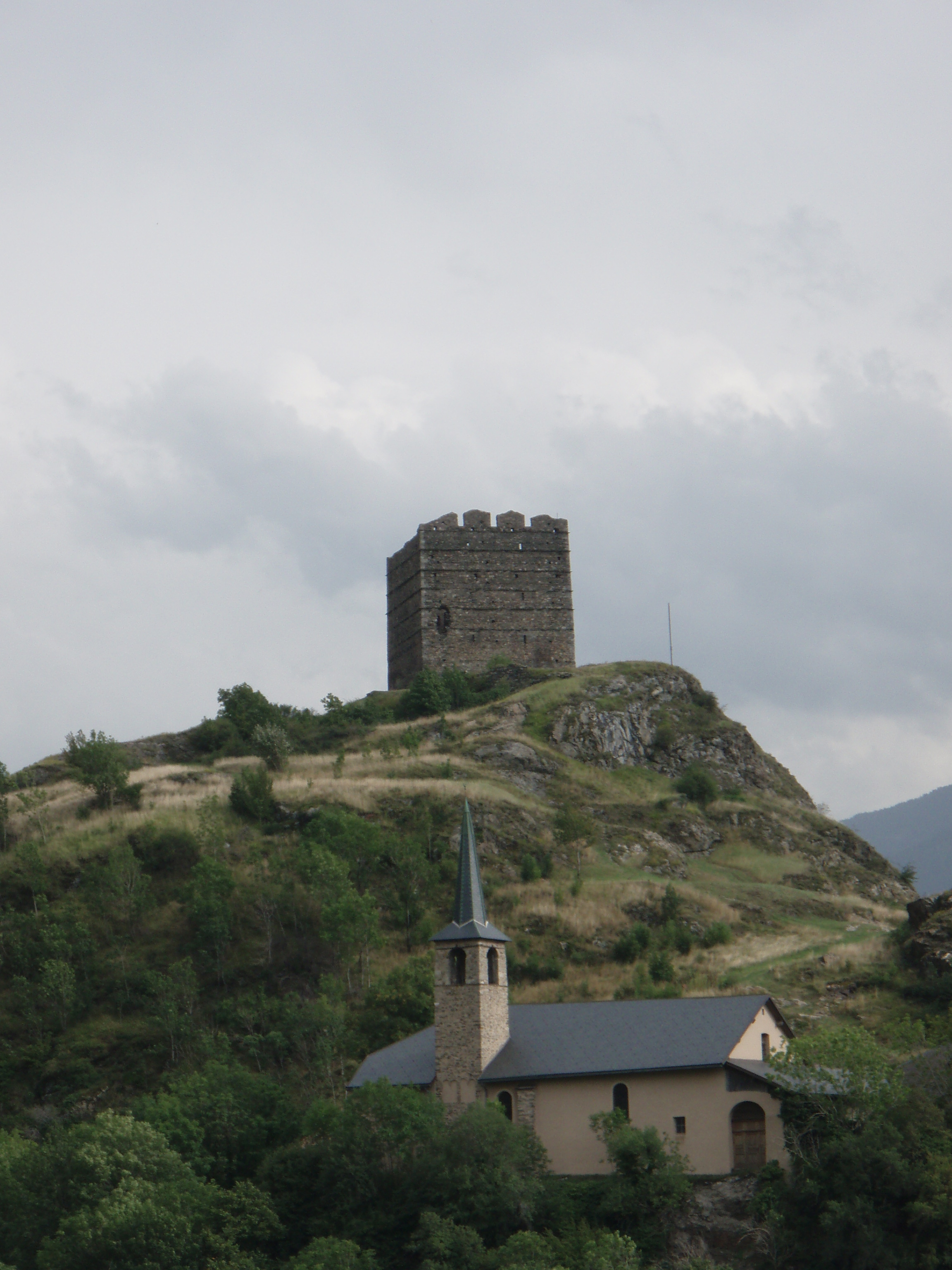 Tour de Bérold, Le Châtel, Savoie, France.